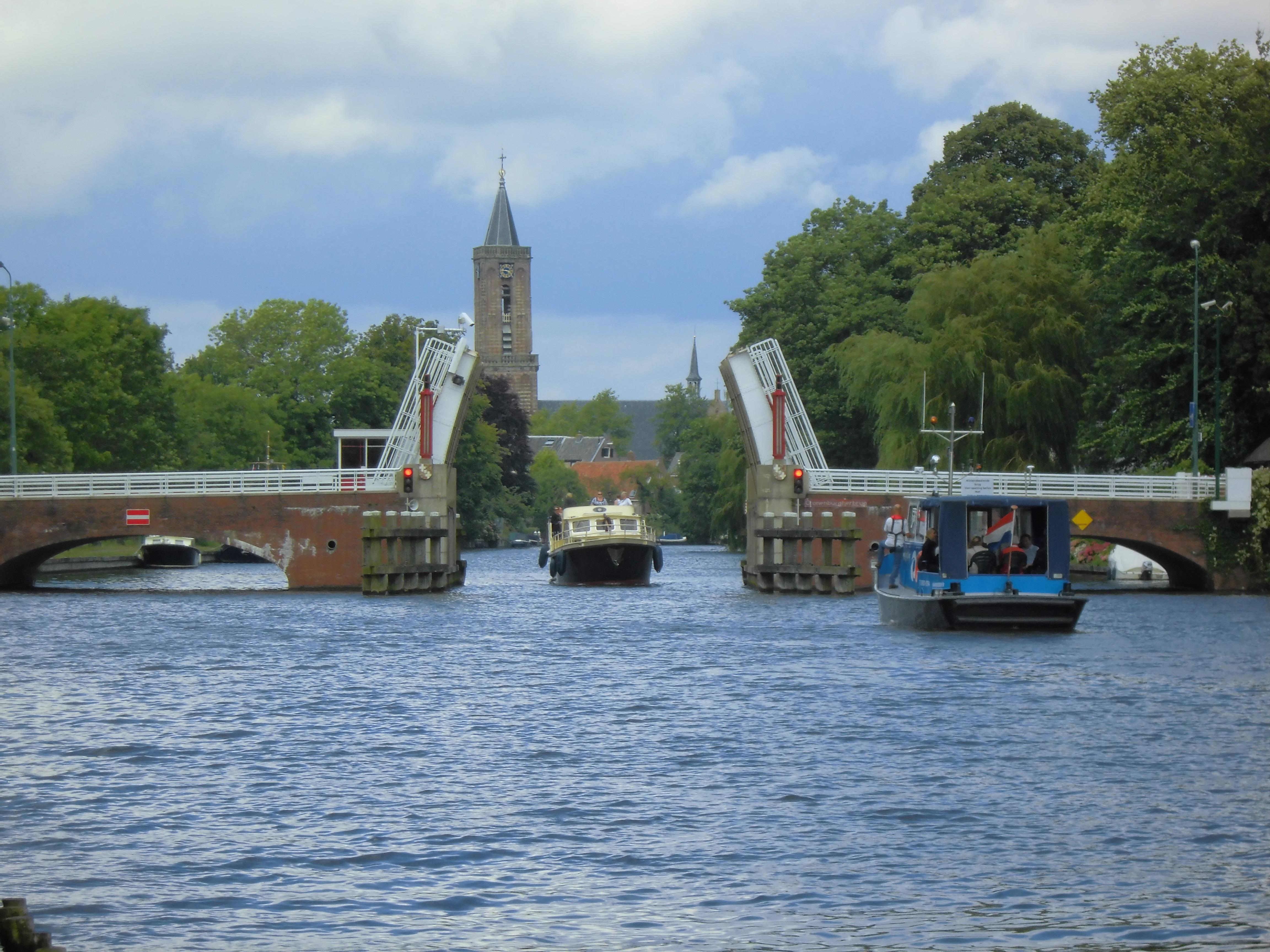 Cronenburgherbrug Loenen aan de Vecht